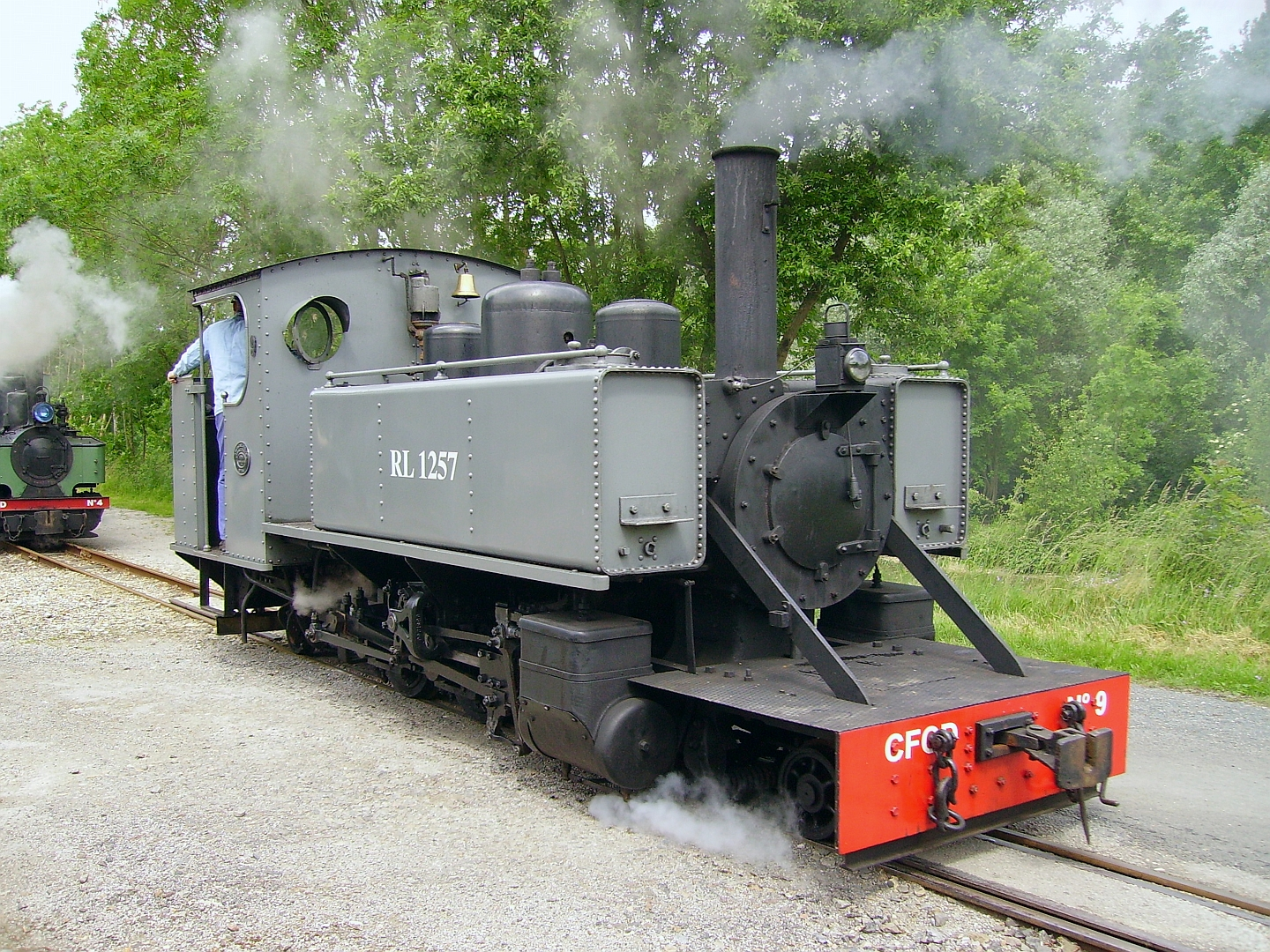 La 131 T N°9 (Alco-Cooke N°57148 de 1916) du Chemin de fer Froissy-Cappy-Dompierre le 27 Mai 2007.